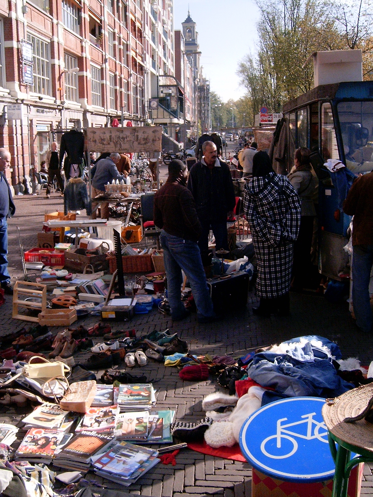 Waterlooplein in Amsterdam, The Netherlands